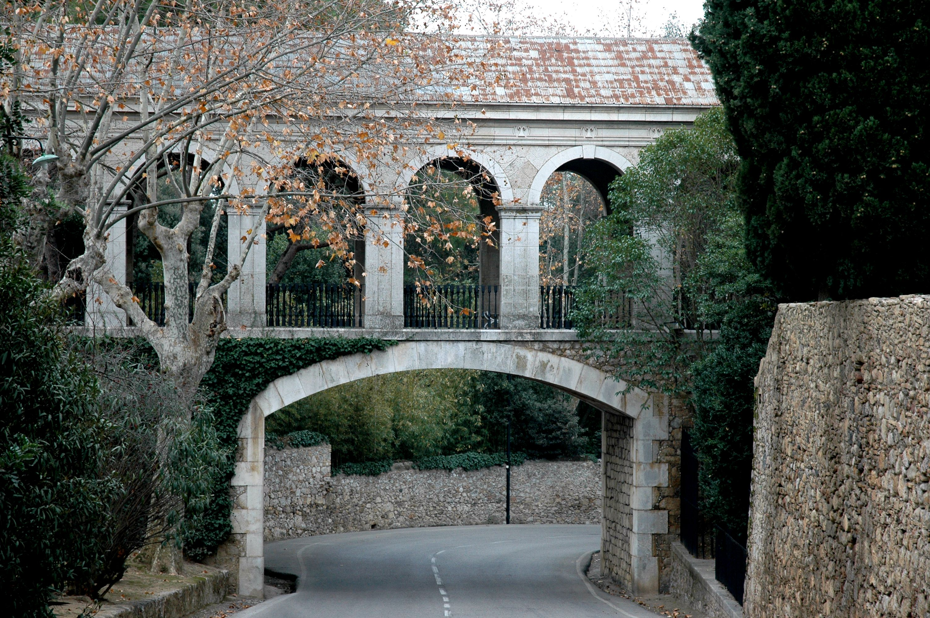 Peralada - Pont Castell-Convent